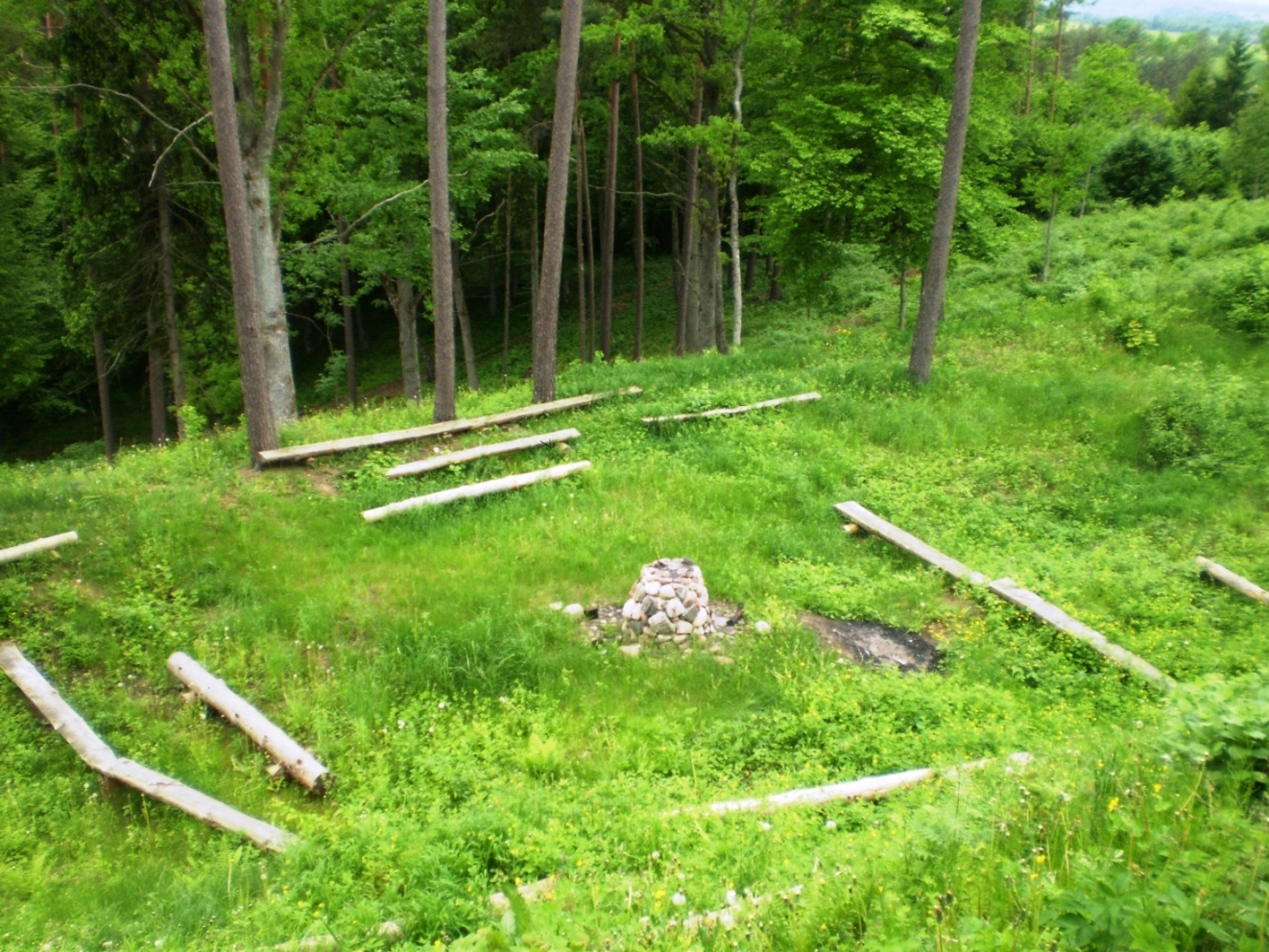 Aukuras. Betygalos piliakalnis, Raseinių raj.